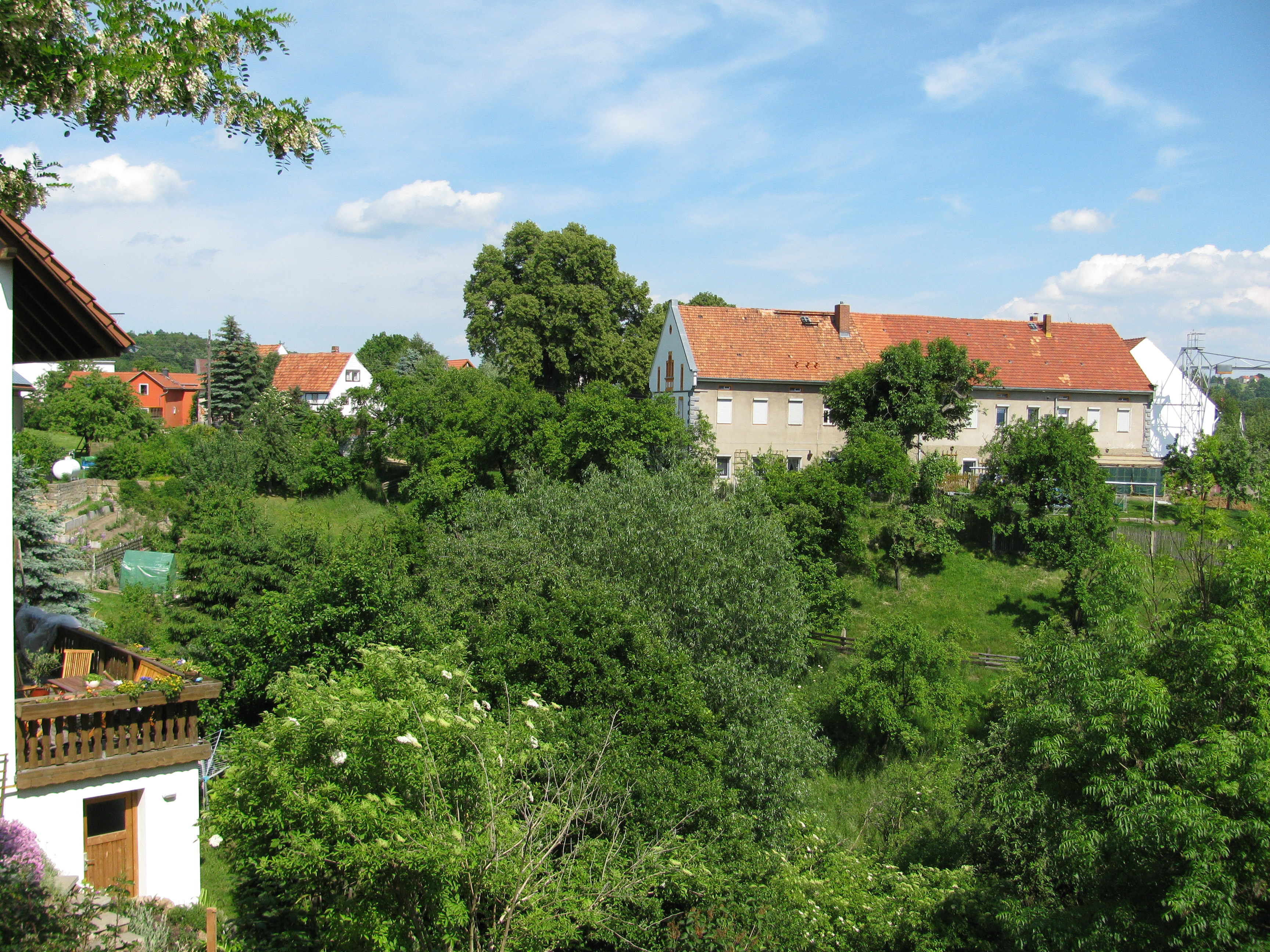 Krieschendorf, Ortsteil von Dresden